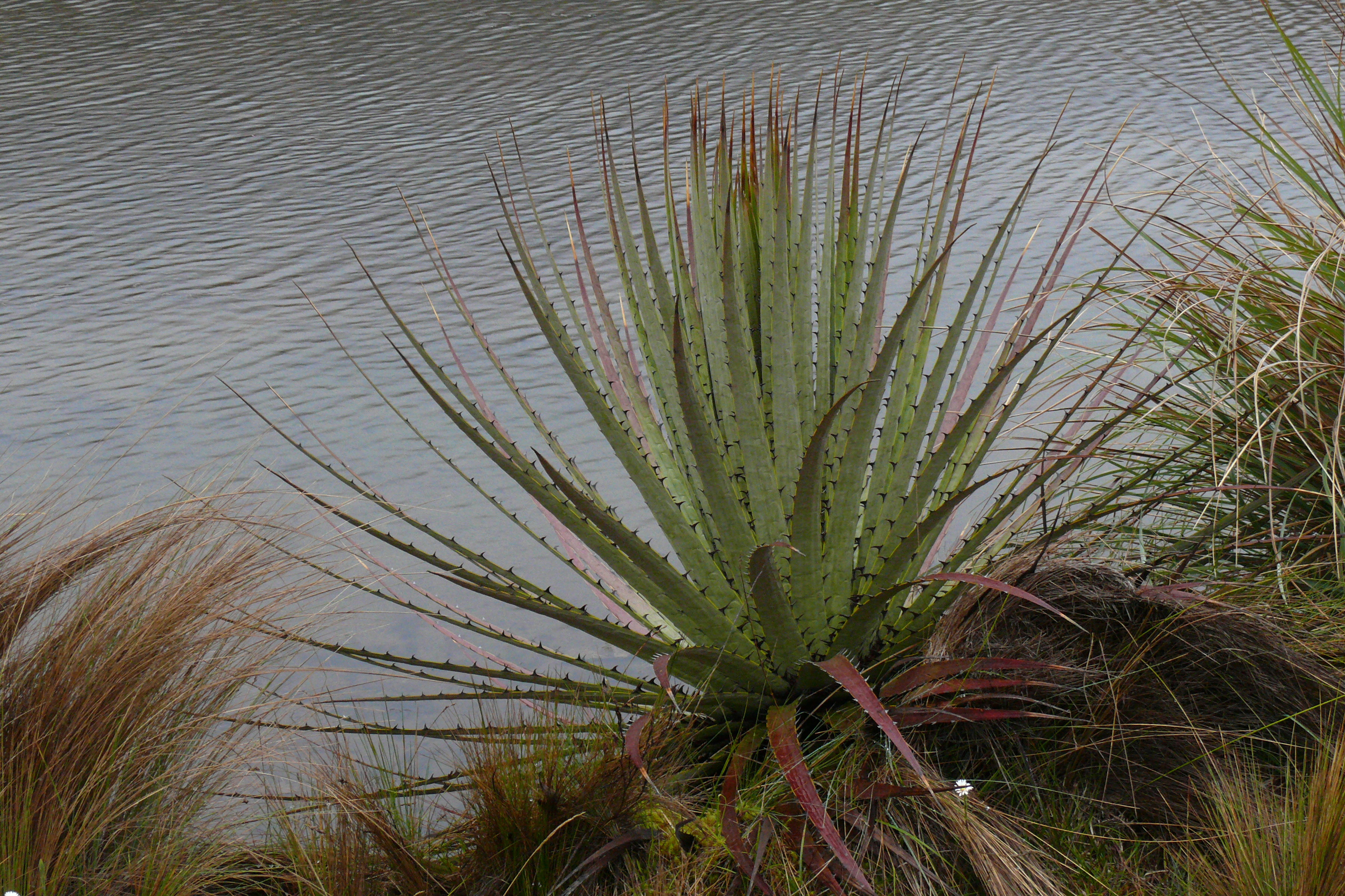 Achupilla, Aguarongo (Puya clava-herculis)